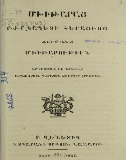 Титульный лист первого издания "Утешении при лихорадках", 1832 год